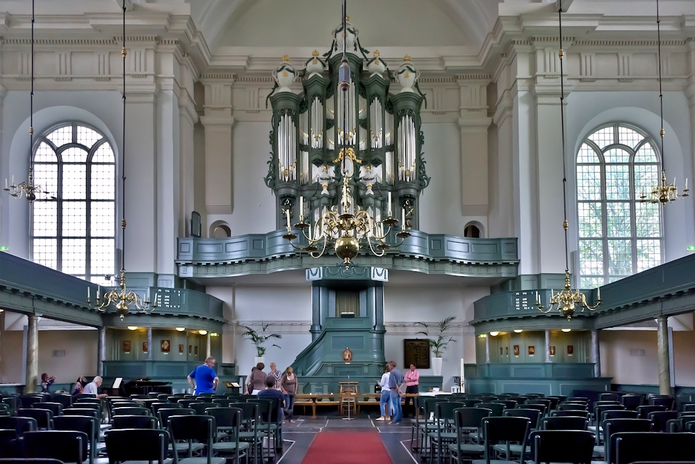 Interieur Hervormde Kerk in Harlingen